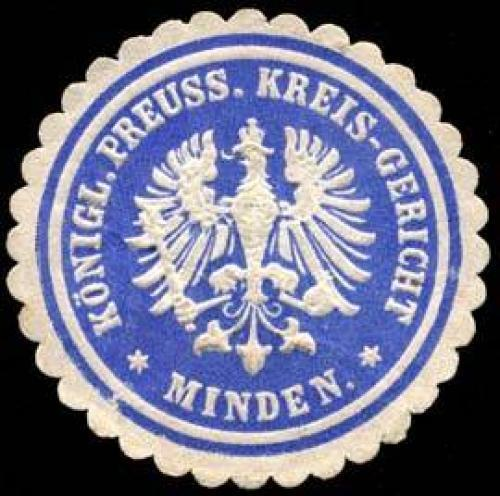 Siegelmarke des preußischen Kreisgerichtes Minden